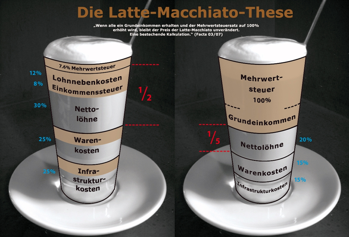 Quelle des Einkommens in Deutschland